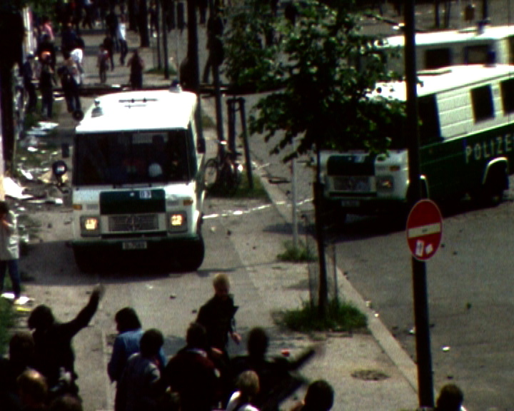 Demonstration gegen den Besuch des US-Präsidenten Ronald Reagan am 11. Juni 1982 in Berlin ( Aufnahme Winterfeldtplatz ).